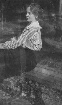 Margit Abenius, 1920-talet.